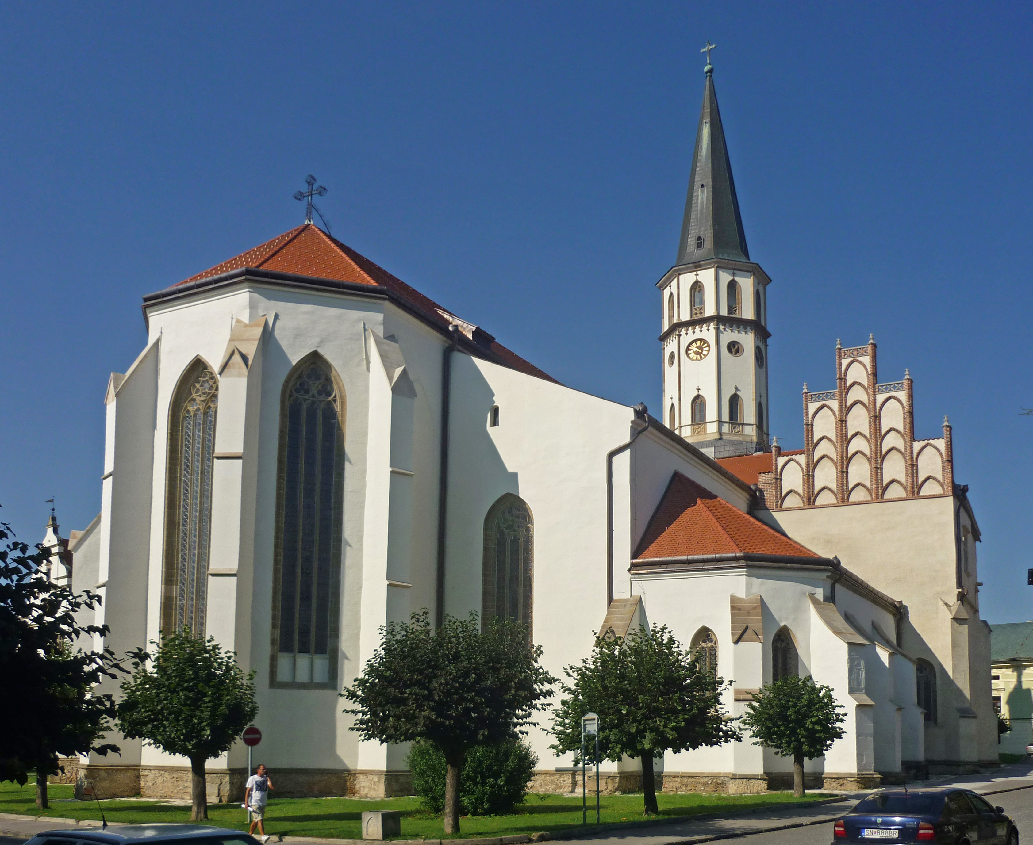 Jakobskirche in Levoča (Leutschau) in der Slowakei